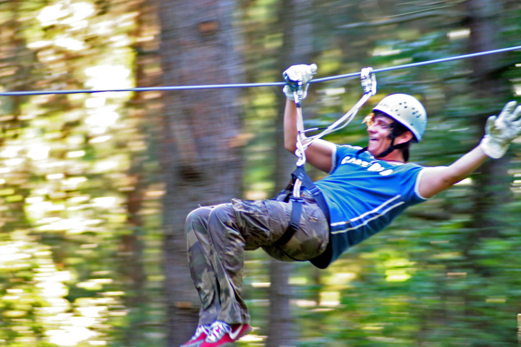 Seilrutschenabfahrt im Kletterwald